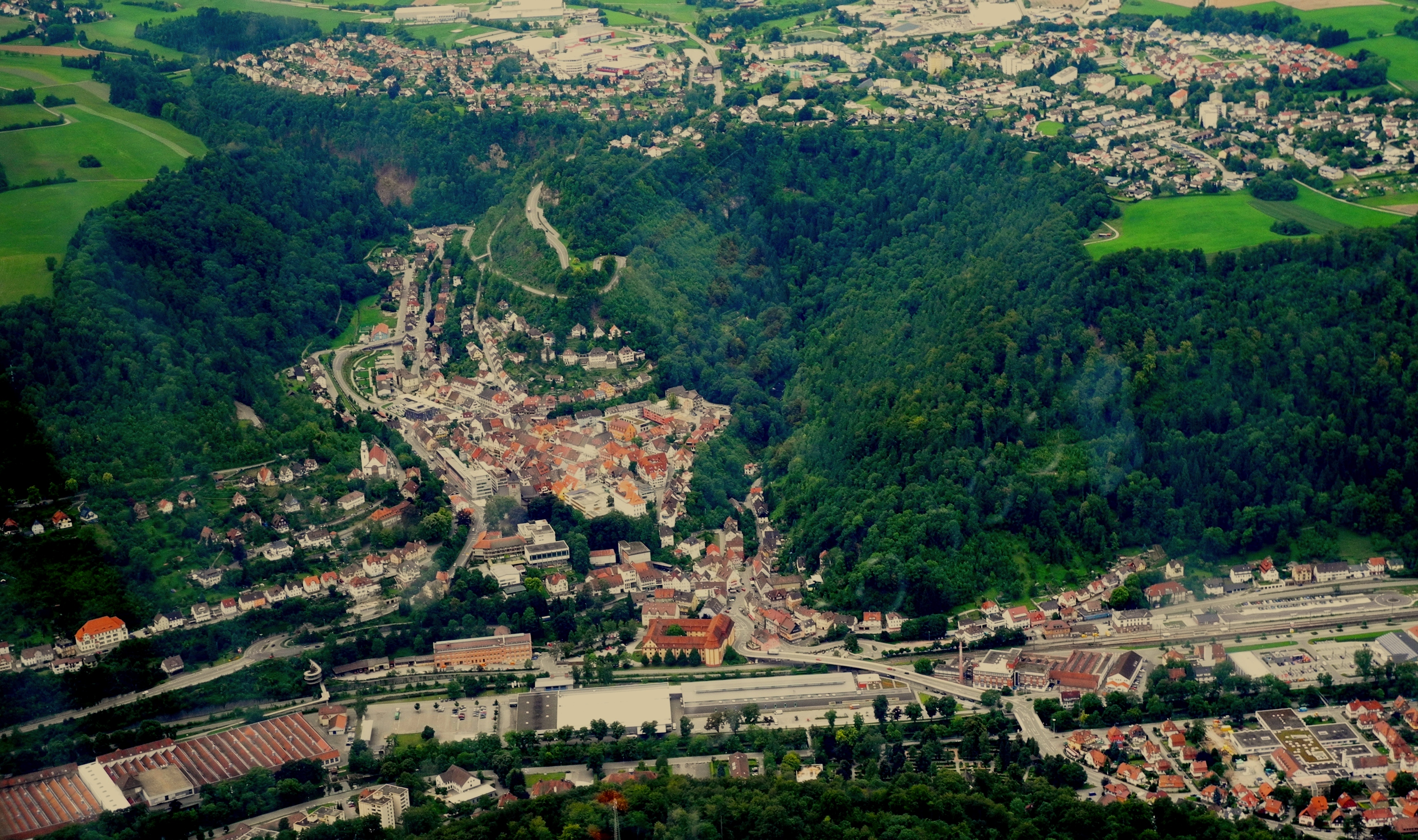 Luftaufnahme der Stadt Oberndorf/N